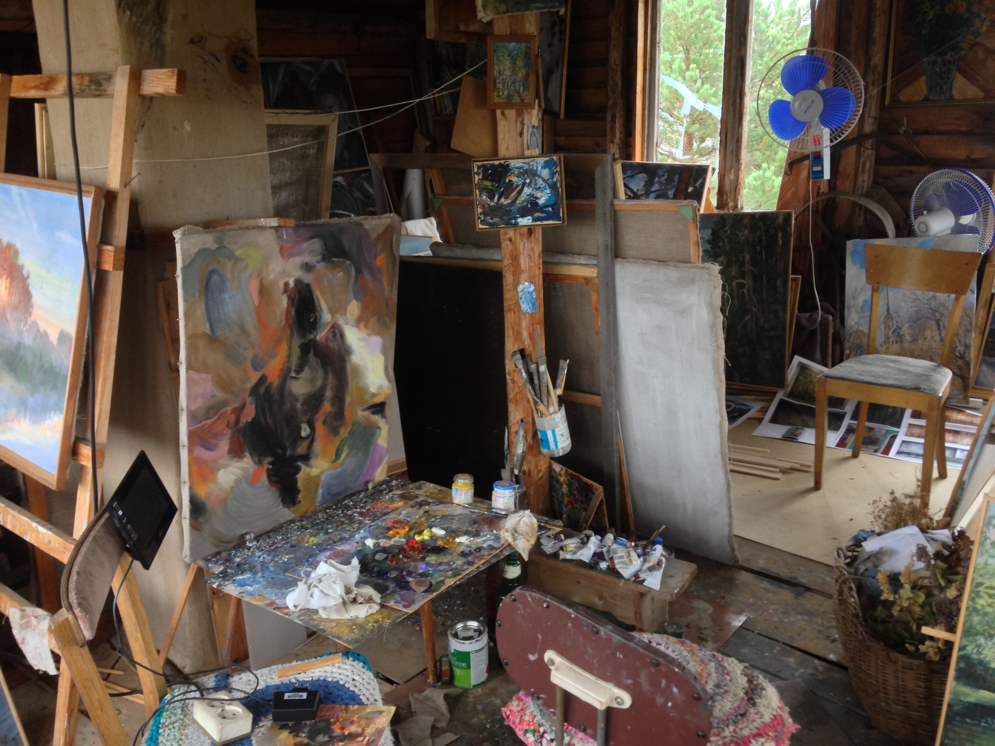 Мастерская художника Алексеева Виктора Ивановича